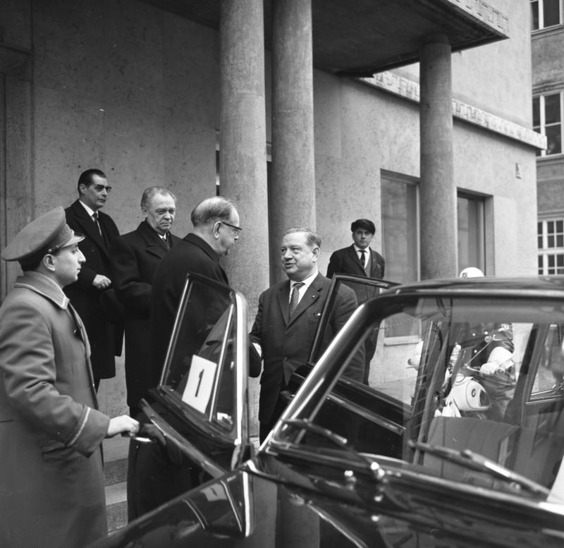 Besuch des schwedischen Ministerpräsidenten, Tage Erlander Empfang: Hotel Continental, München